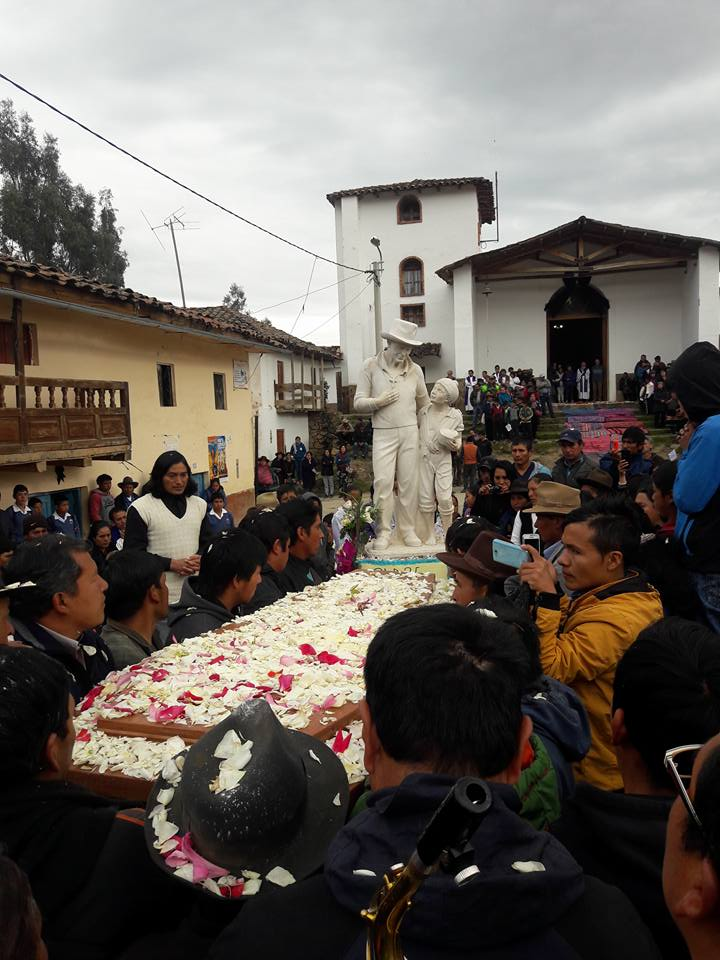 El cuerpo del padre Ugo frente a su estatua conmemorativa y la capilla Santa Rosa de Sapcha